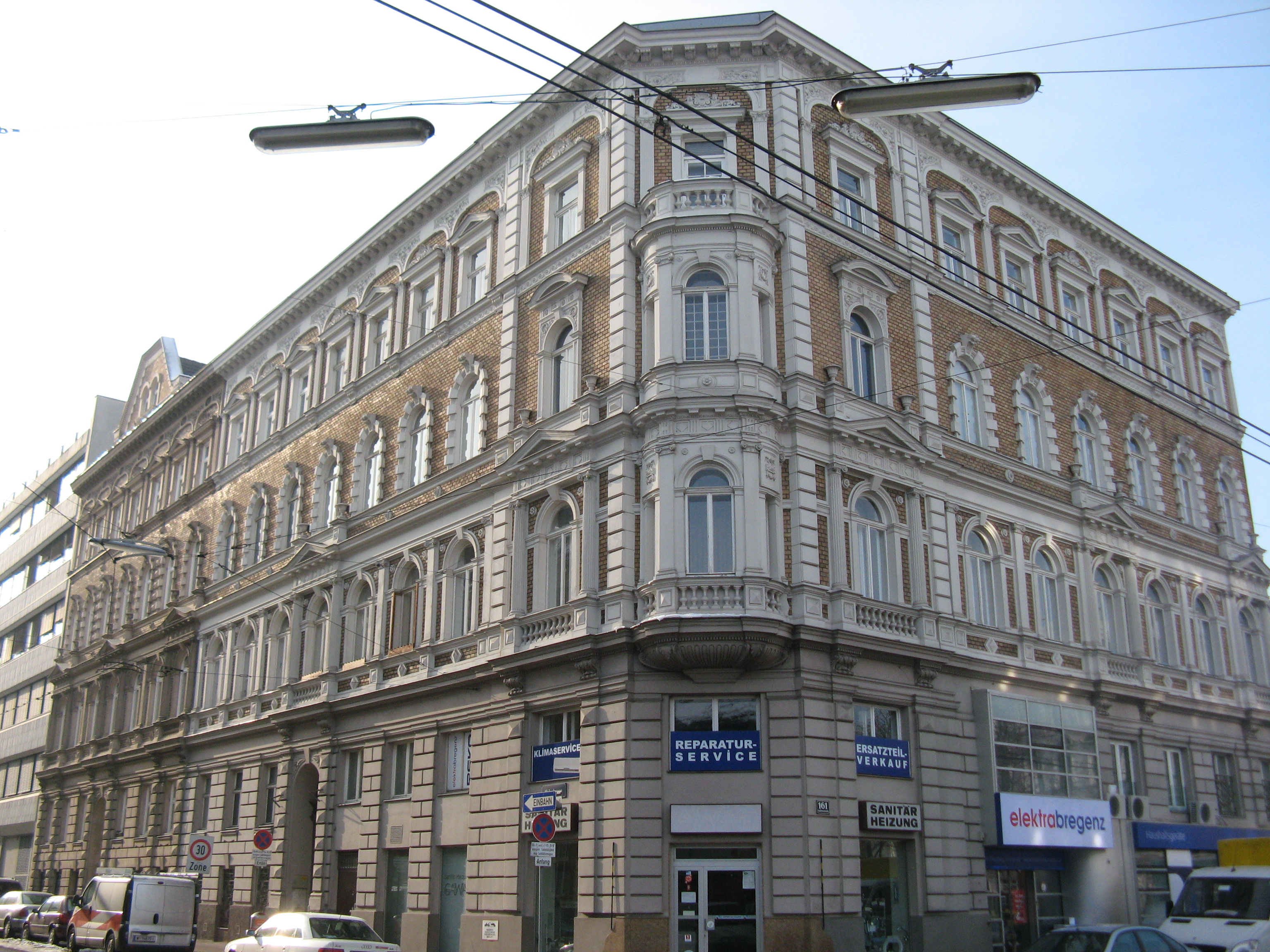 Historistische Zinshäuser, Leebgasse 18 (1889) und 20 (1892), Wien-Favoriten